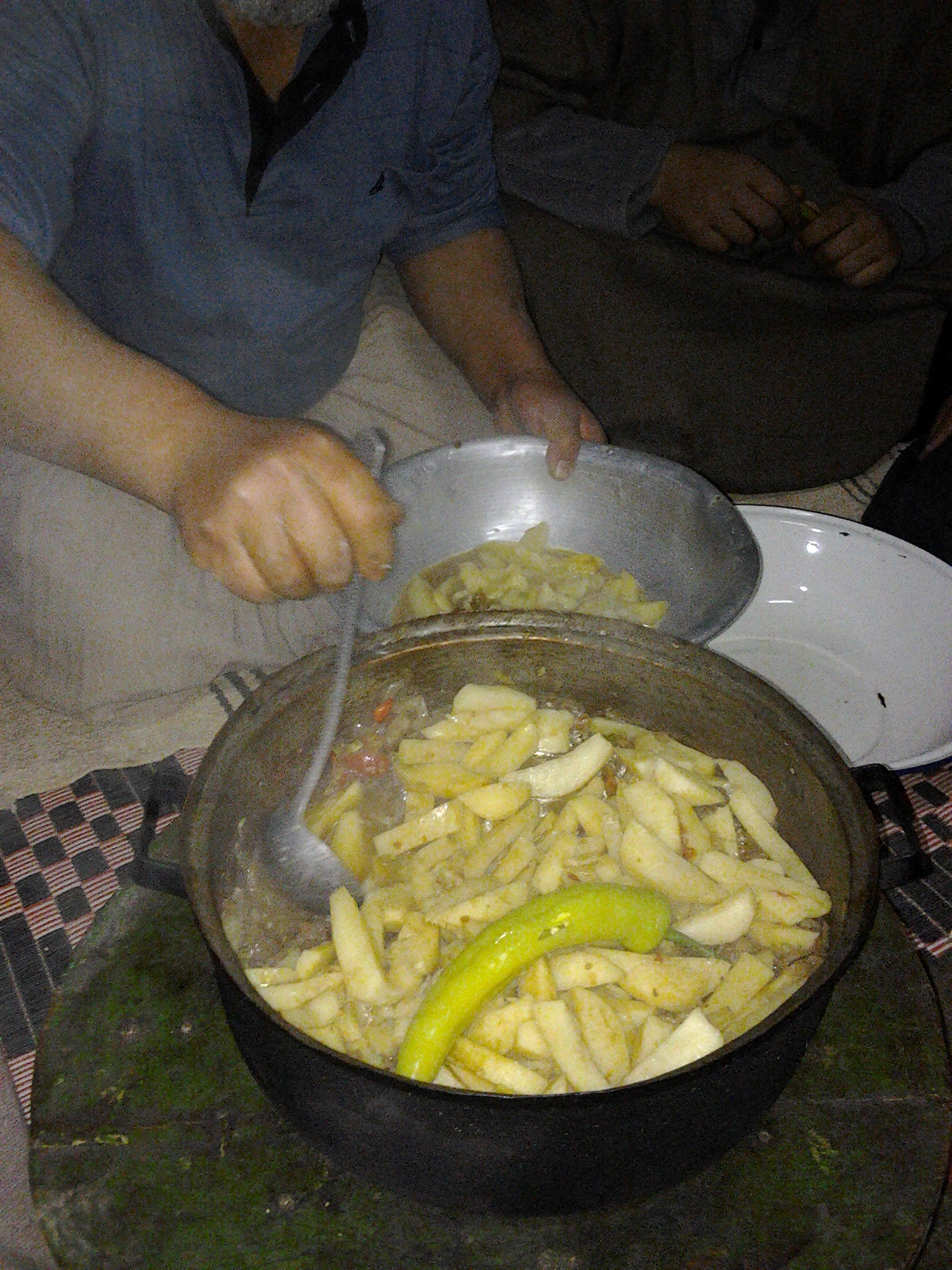 C'est un plat traditionnel de la région de Gardaia en Algérie appeler Chtitha Batata This is an image of food from Algeria